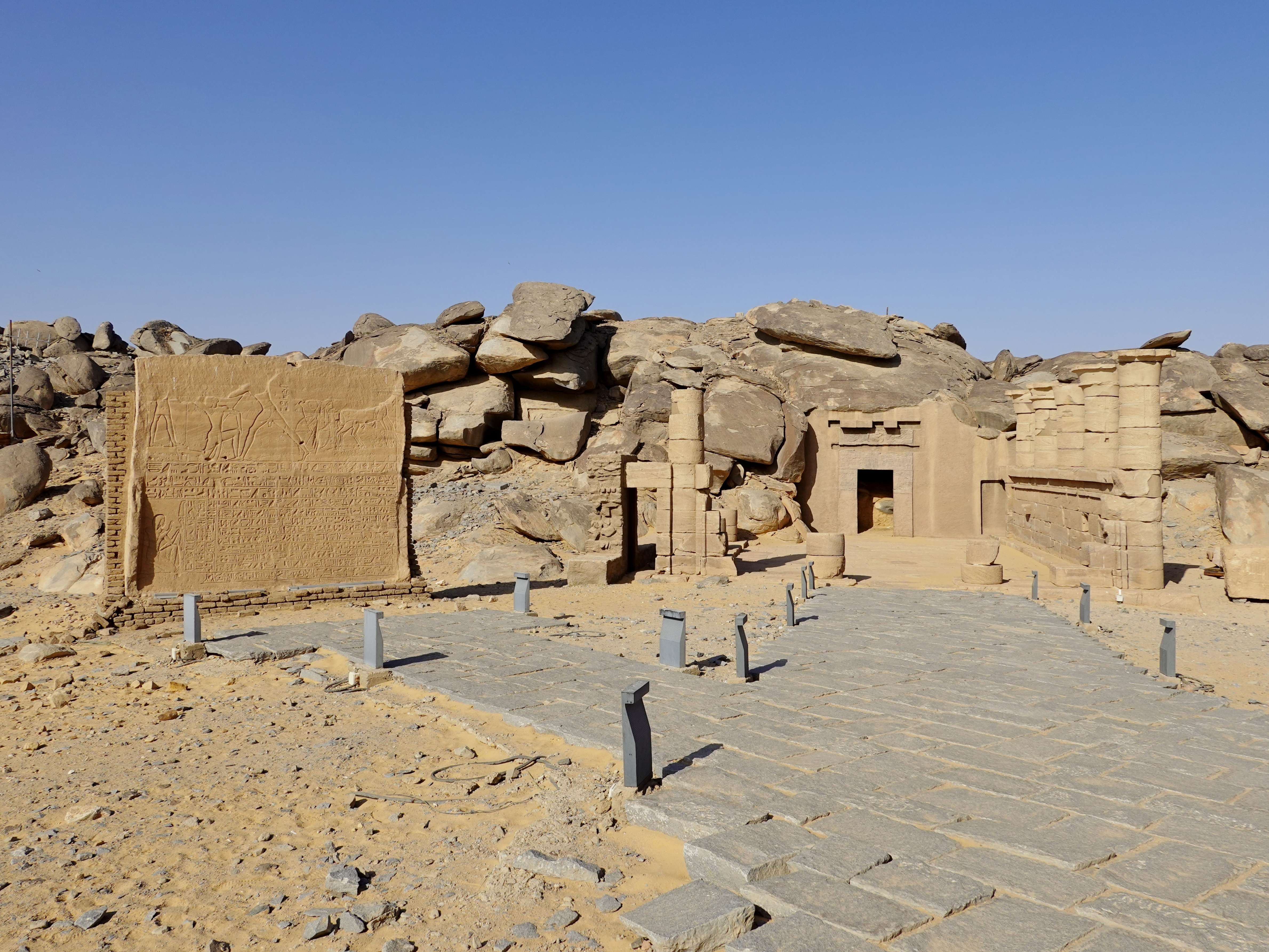 Felsenkapelle des nubischen Gottes Dedun (Dedwen) und Standort der Amenemope-Stele auf der Insel Neu-Kalabscha im Nassersee, Ägypten